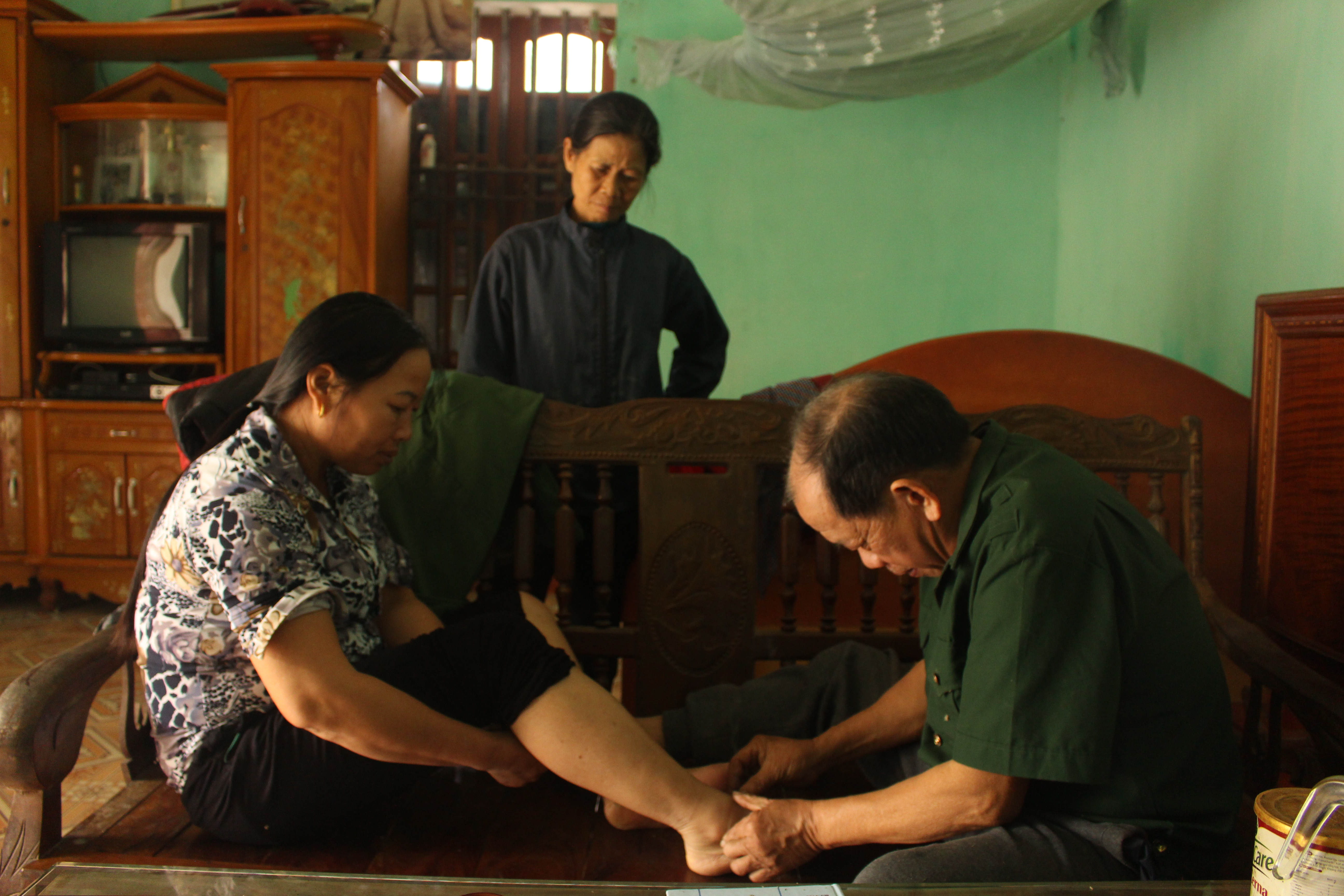 中文（台灣）: 正在使用艾灸的太原艾人